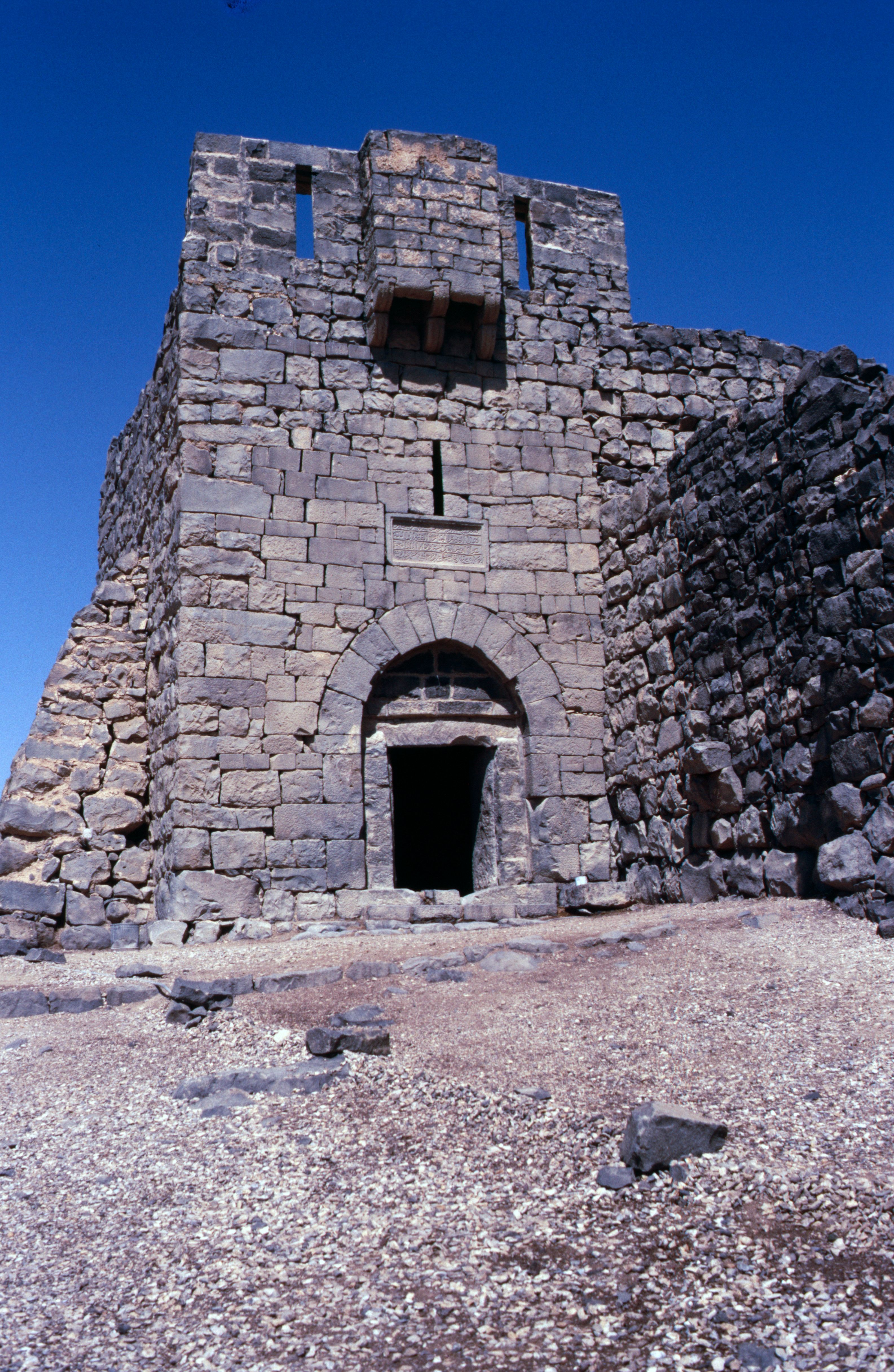 Ein Eckturm der Burg 1988